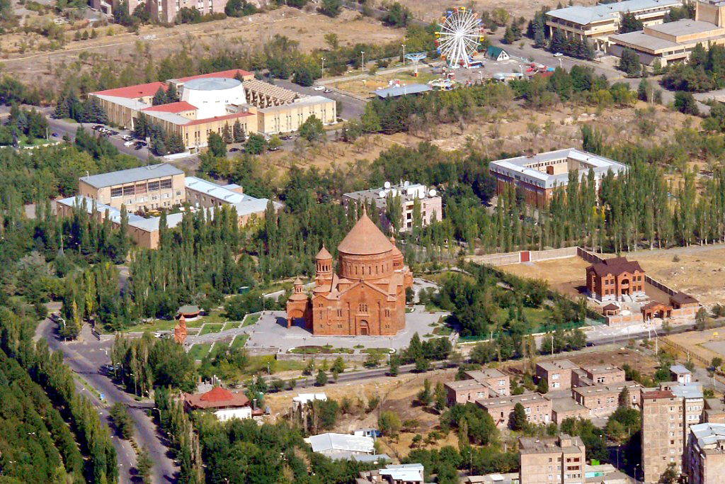 Եկեղեցու հեղինակը ՀՀ վաստակավոր ճարտարապետ Արտակ Ղուլյանն է, նախագծի կոնստրուկտորները՝ Հովհաննես Մեյրոյանը և Տիգրան Դադայանը[1]։ Որմնանկարների հեղինակներն են հայր և որդի Աբրահամ ու Հայկ Ազարյանները։ Եկեղեցու քանդակազարդման աշխատանքներին մասնակցել է շուրջ 40 քանդակագործ և զարդագործ-վարպետ։